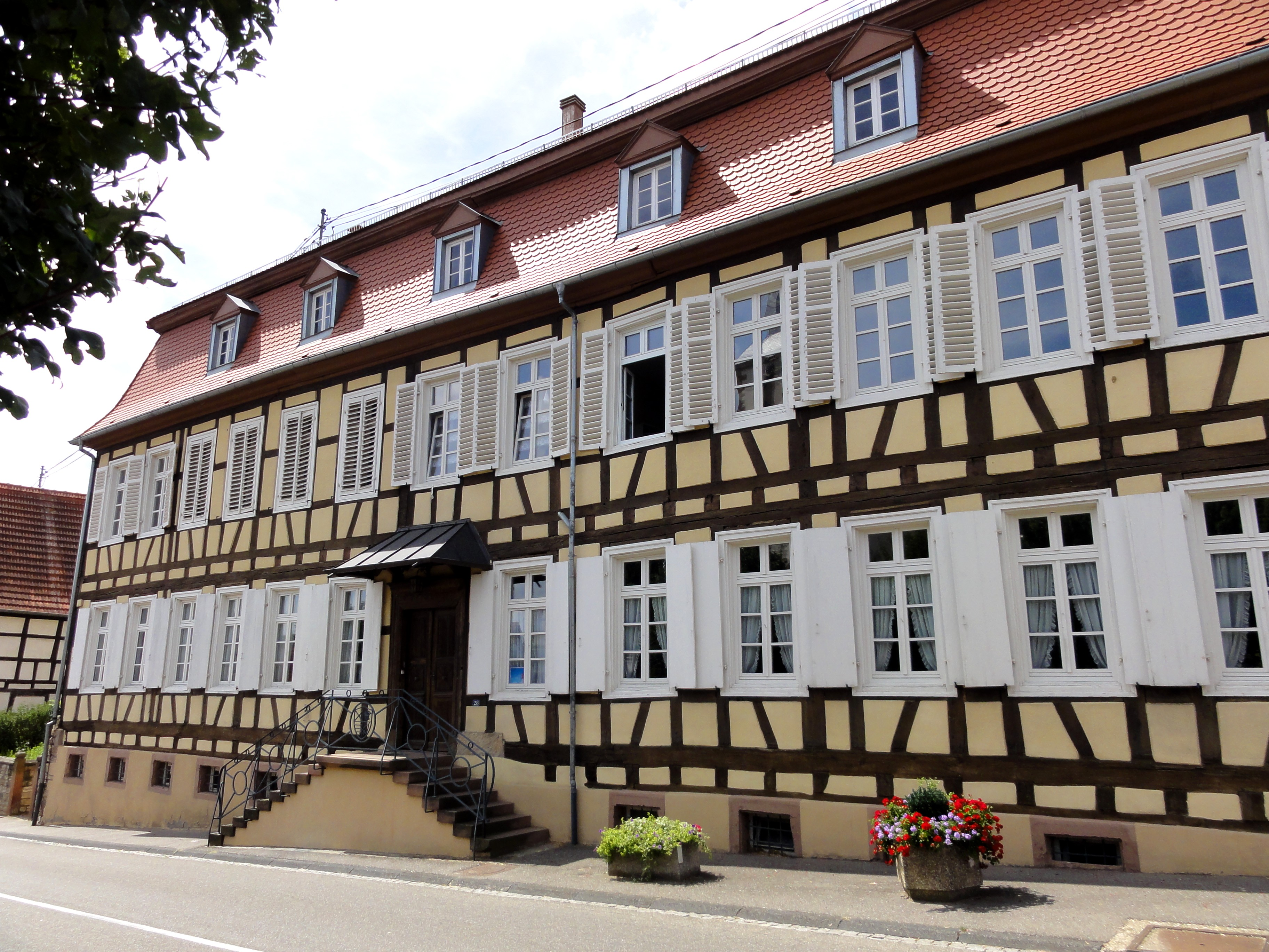 Alsace, Bas-Rhin, Kutzenhausen, Ancien baillage des Sires de Fleckenstein, Ancien presbytère (XVIIIe). .